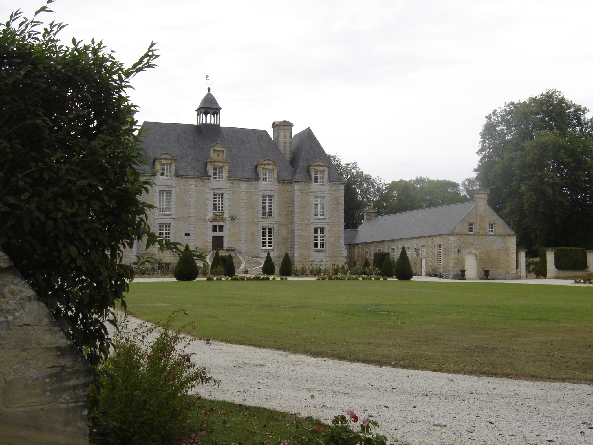 Château d'Esquay-sur-Seulles, (Inscrit, 1927) château construit au début du XVIIè siècle .